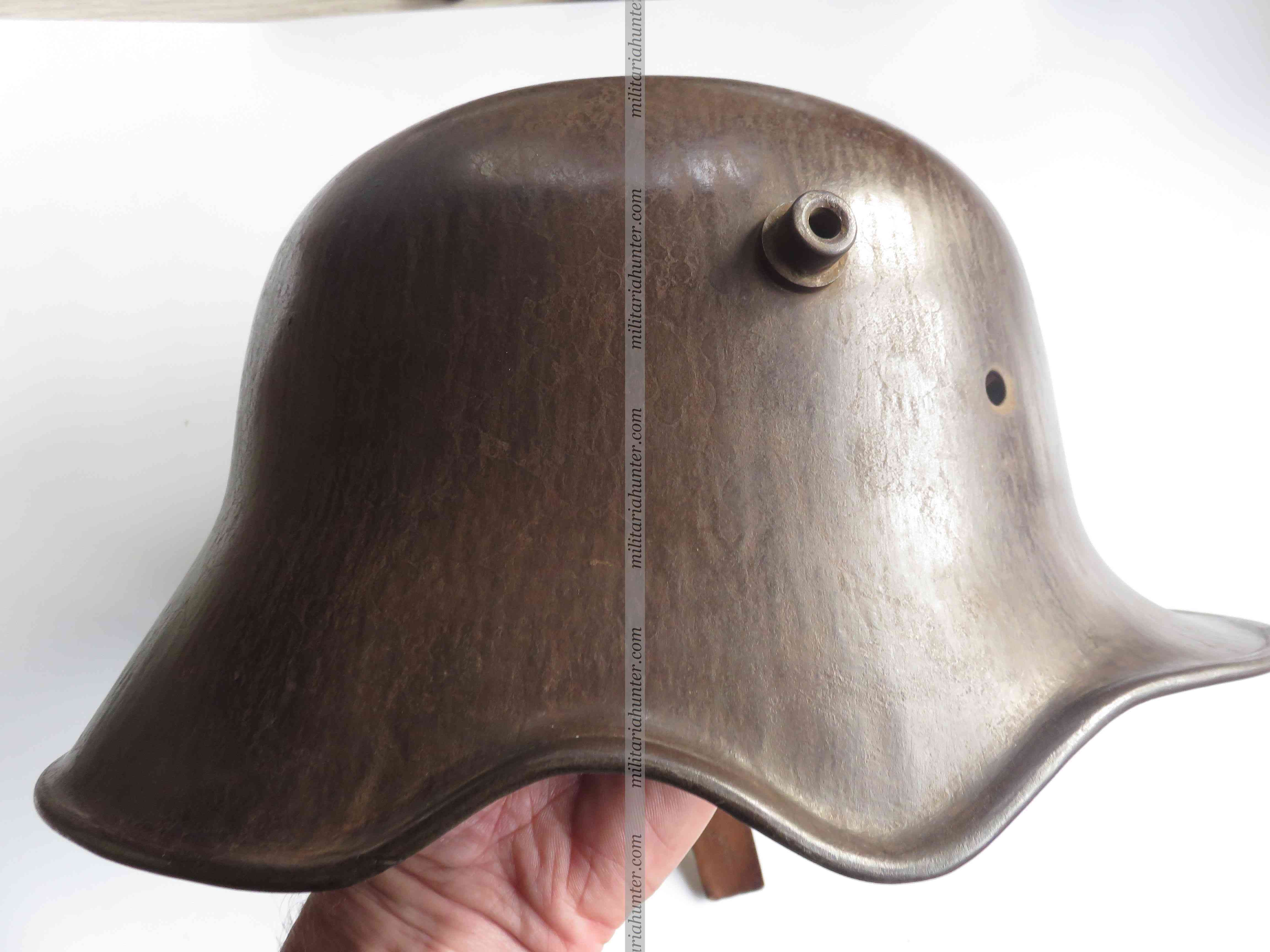 Casque Stahlhelm M1918 à échancrures pour dégagement des oreilles permettant d'utiliser moyens de communication et d'éviter l'assourdissement lors d'explosions